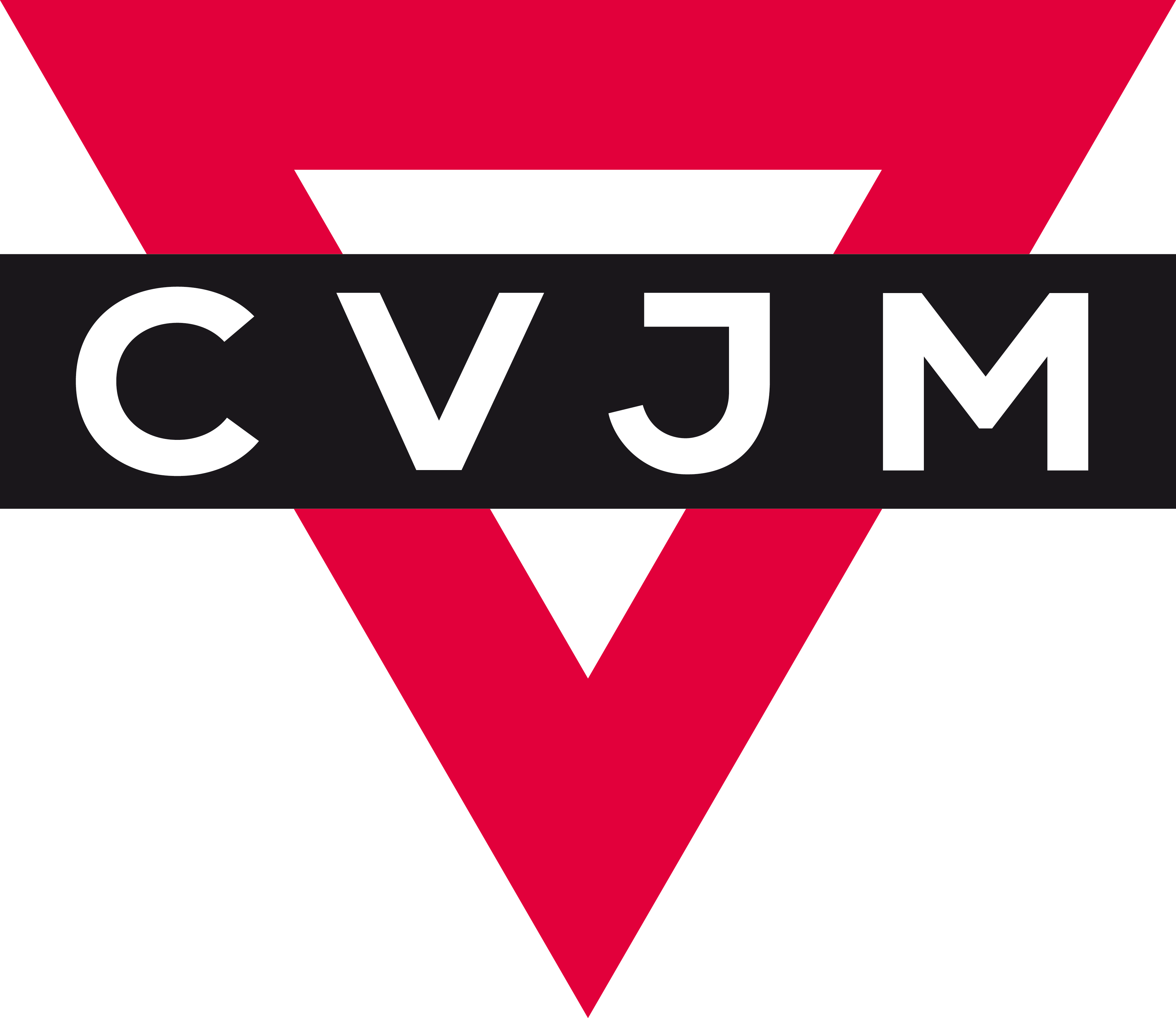 Das CVJM-Dreieck wurde 1890 im CVJM-Ausbildungszentrum Springfield-College eingeführt. Der obere Dreieckbalken symbolisiert den Geist, der von der Seele und dem Körper (den beiden anderen Schenkeln des Dreiecks) gestützt wird. Das Dreieck soll aussagen, dass der Dienst des CVJM dem ganzen Menschen gilt. Nach dem 1. Weltkrieg fand das CVJM-Dreieck Eingang in die Großstadt-CVJM, heute gilt es als Symbol der CVJM-Arbeit allgemein.